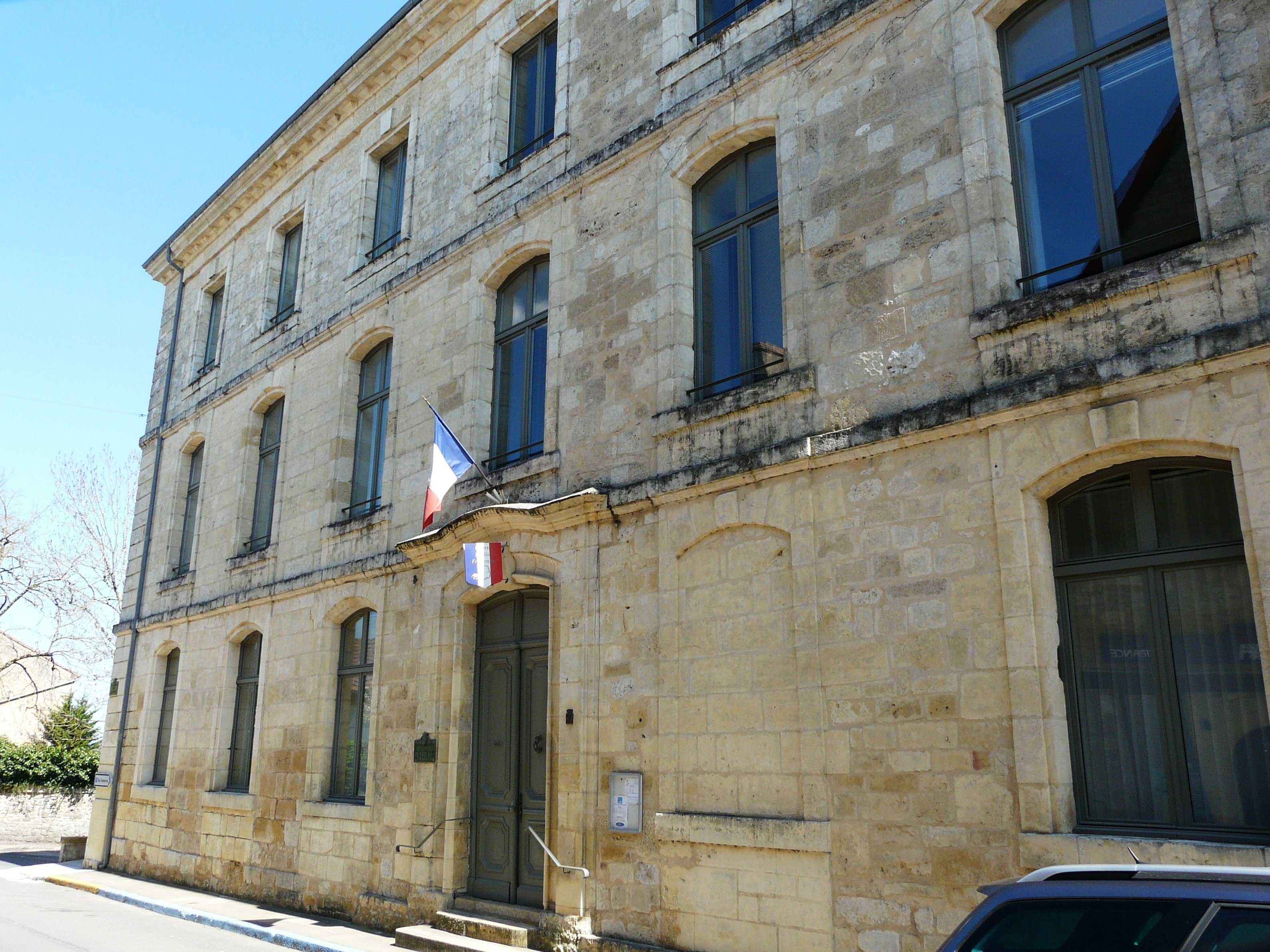 La mairie, rue Romieu, Beaumont-du-Périgord, Dordogne, France.